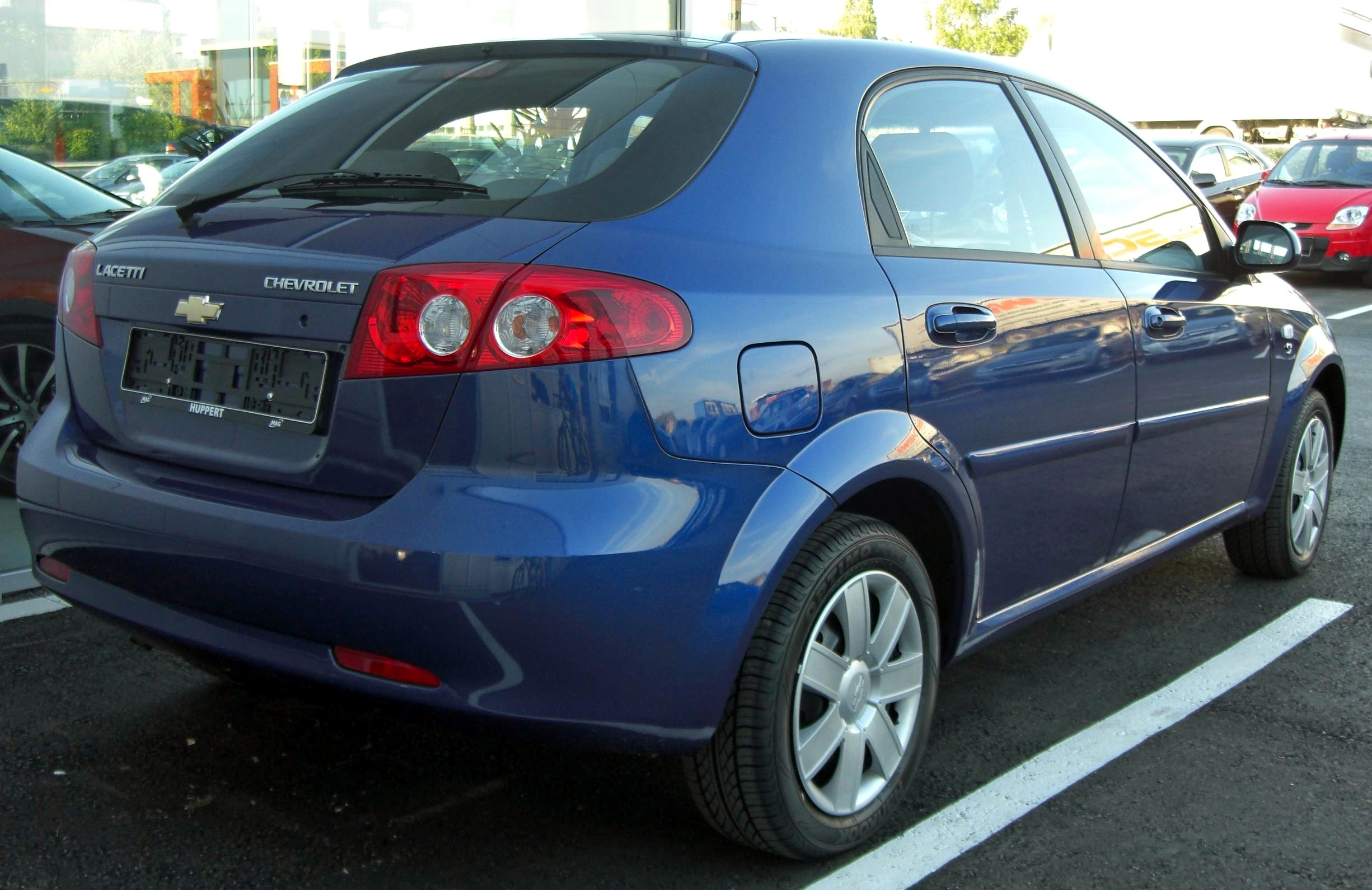 Chevrolet Lacetti